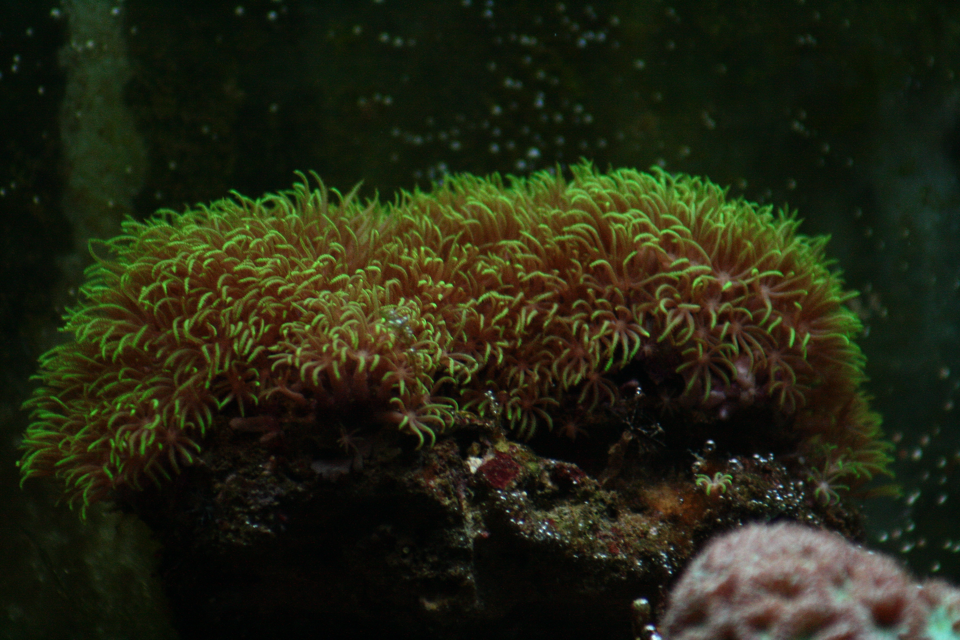 Pachiclavularia viridis en acuario de arrecife